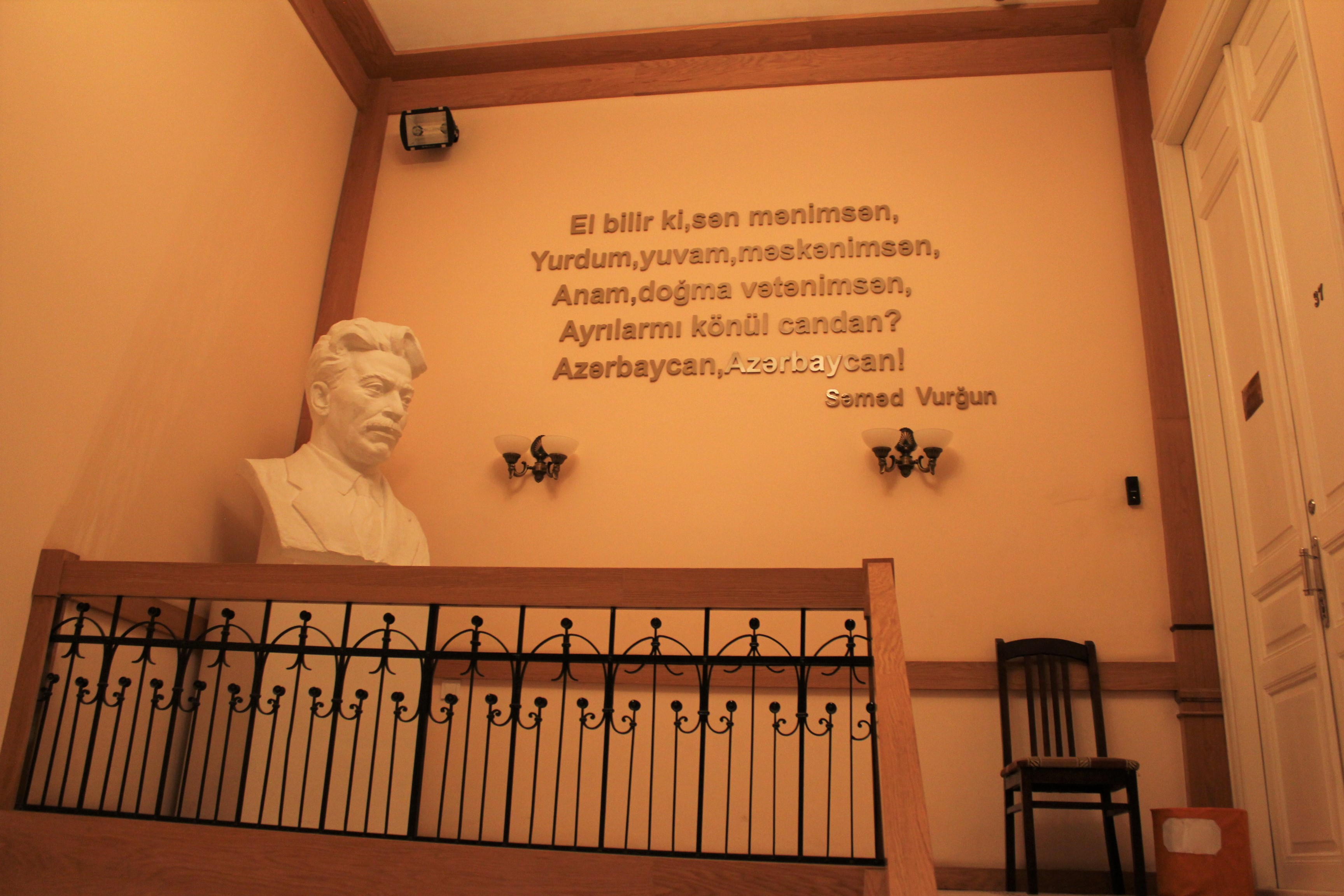 Вход в дом-музей азербайджанского поэта, драматурга, ученого, общественного деятеля, двукратного лауреата Государственной премии Самед Вургуна.